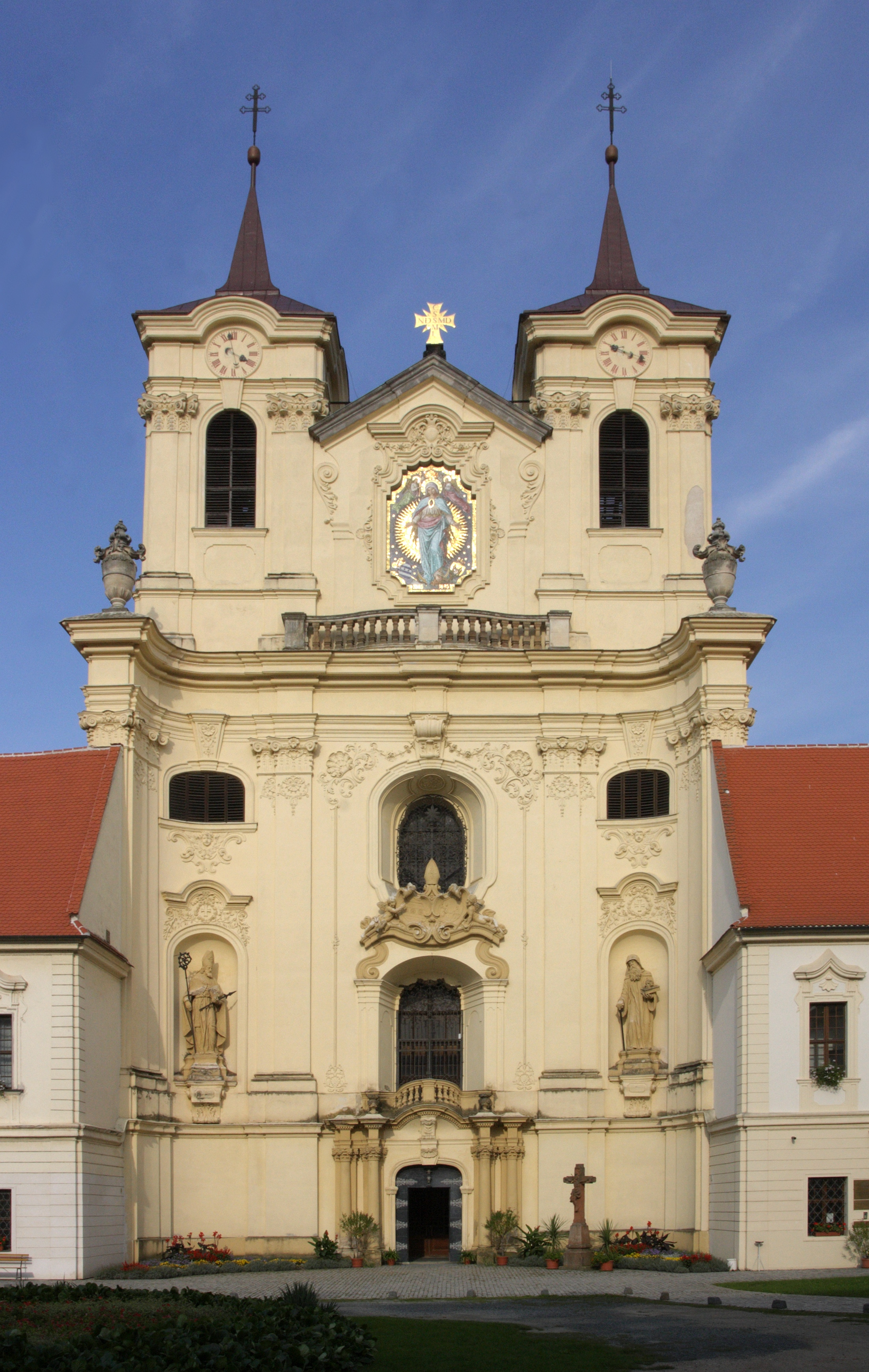 Rajhrad - benediktinský klášter, hlavní kostelní průčelí.